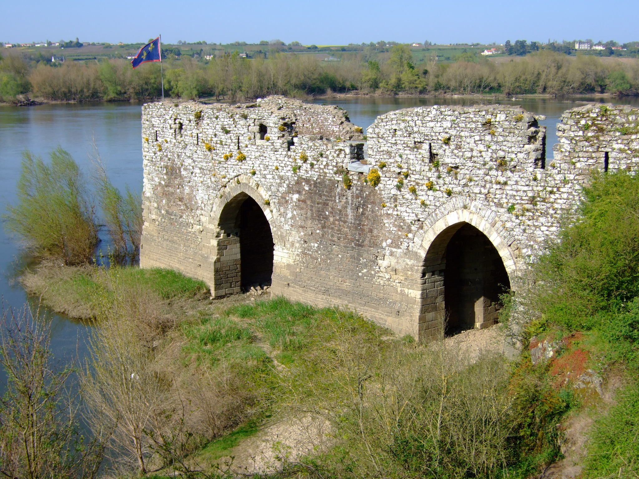 Le moulin à ogives de Champtoceaux